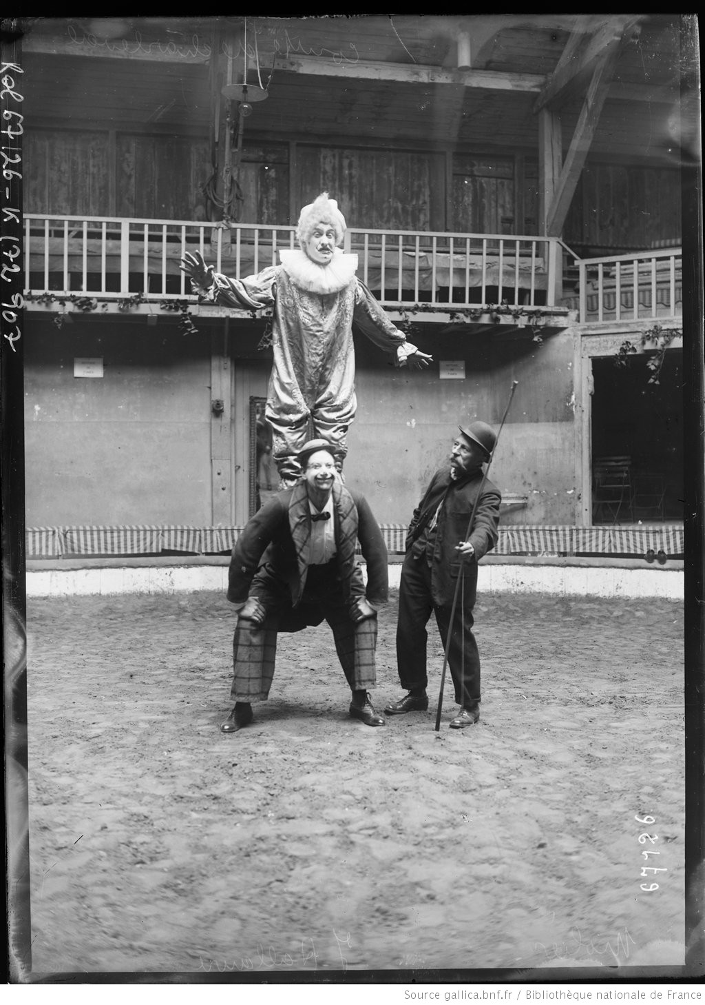 Ernest Molier, à droite, avec le clown Jean Hallaure soutenant le comte de Charleval en juin 1921 (Source : ).